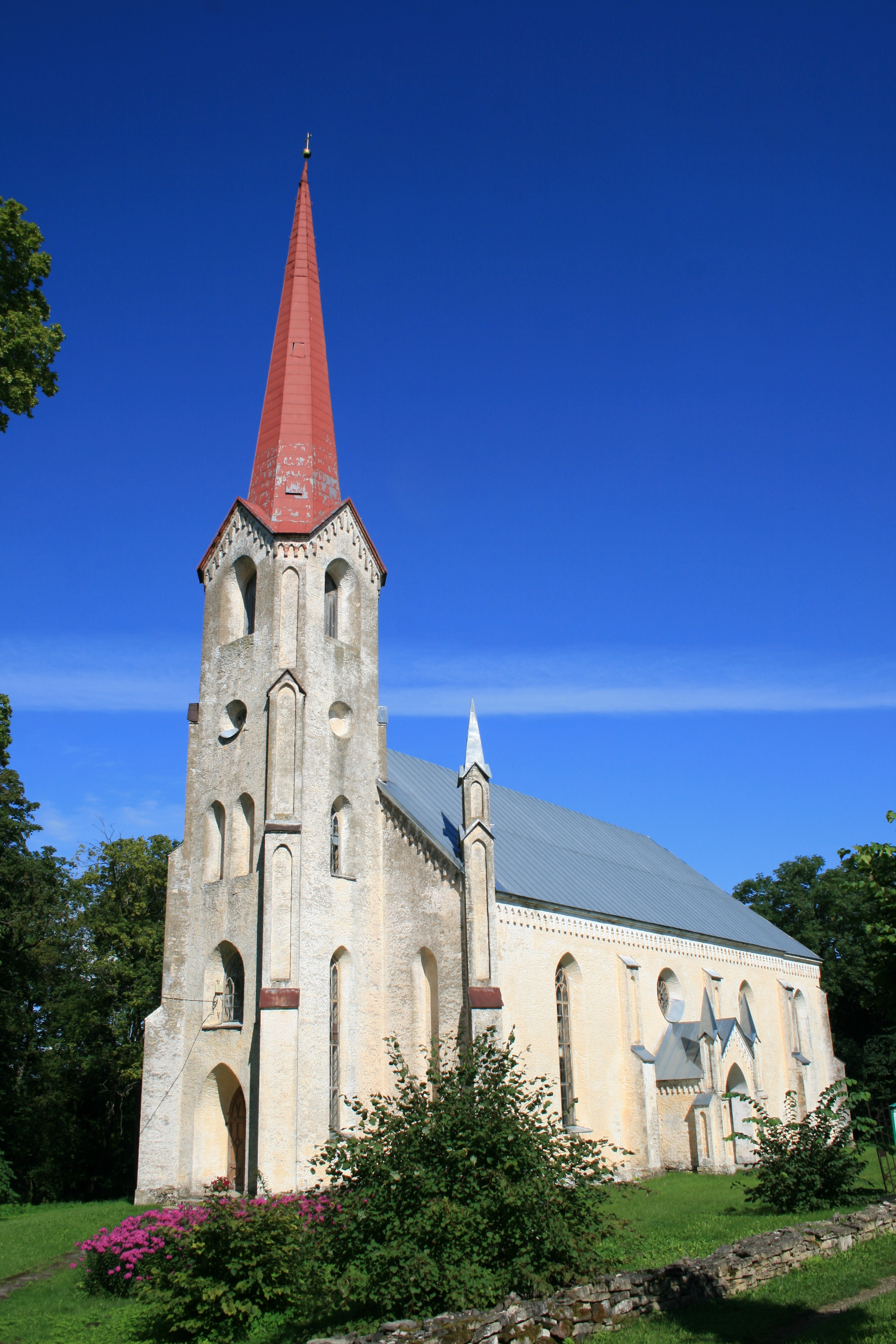 Lihula kirik